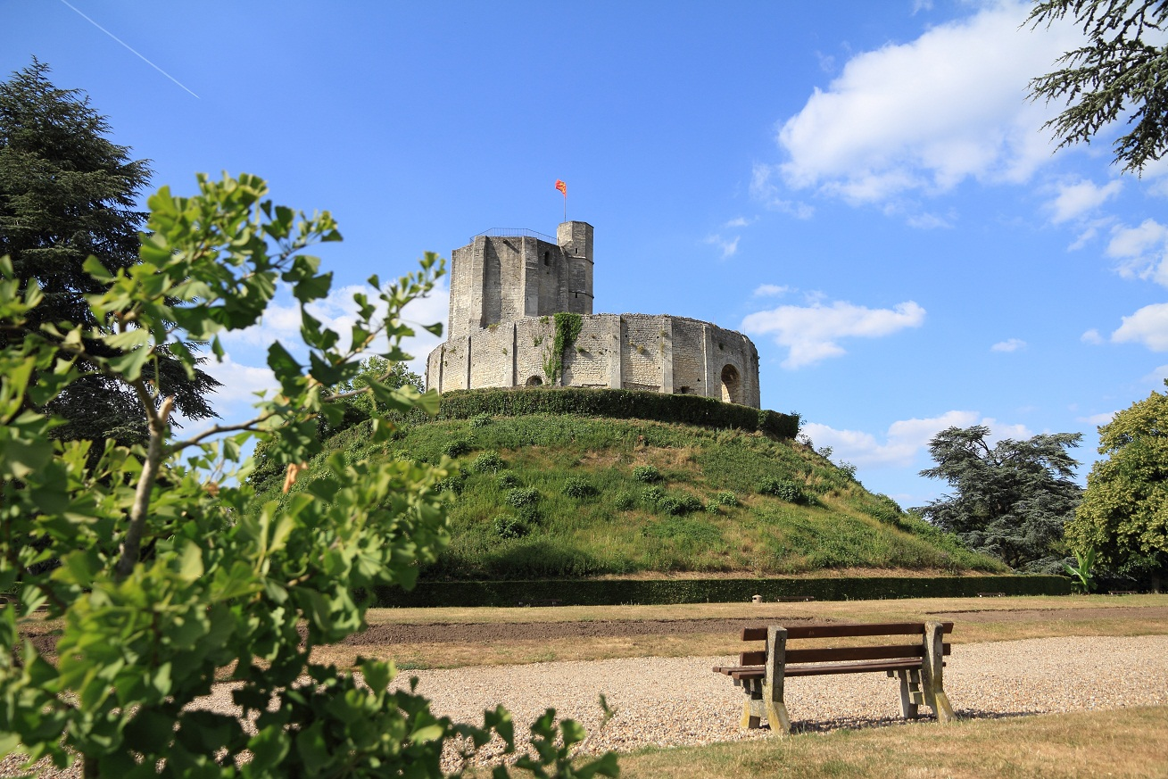 Vue du château de Gisors en juin 2011, Normandie, France.